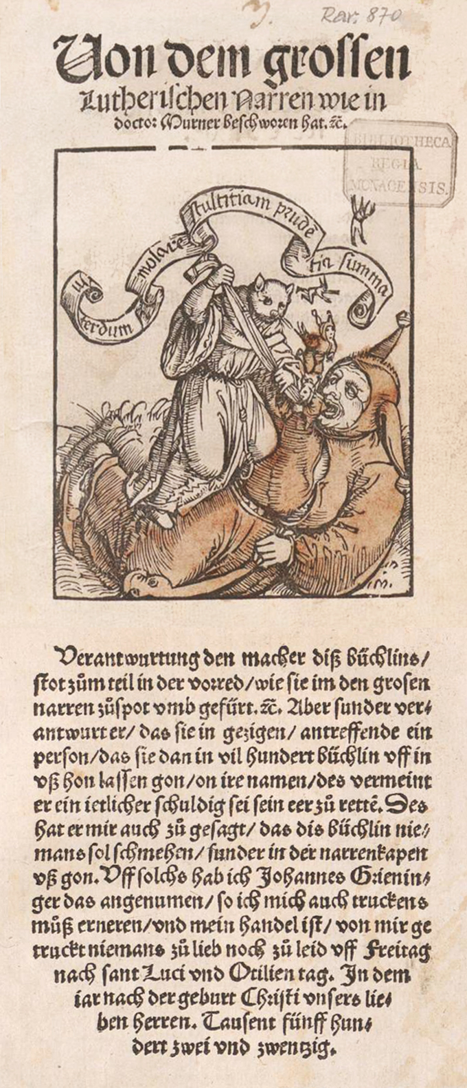 Titel und Schlusswort von Johannes Grieninger in: Thomas Murner: Von dem großen lutherischen Narren. Straßburg: Grüninger, 1522